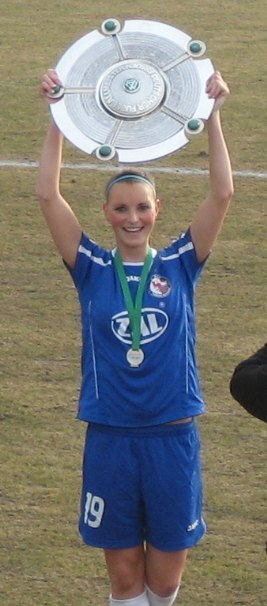 Corina Schröder vom 1. FFC Turbine Potsdam mit der Meisterschale der Saison 2010/11.